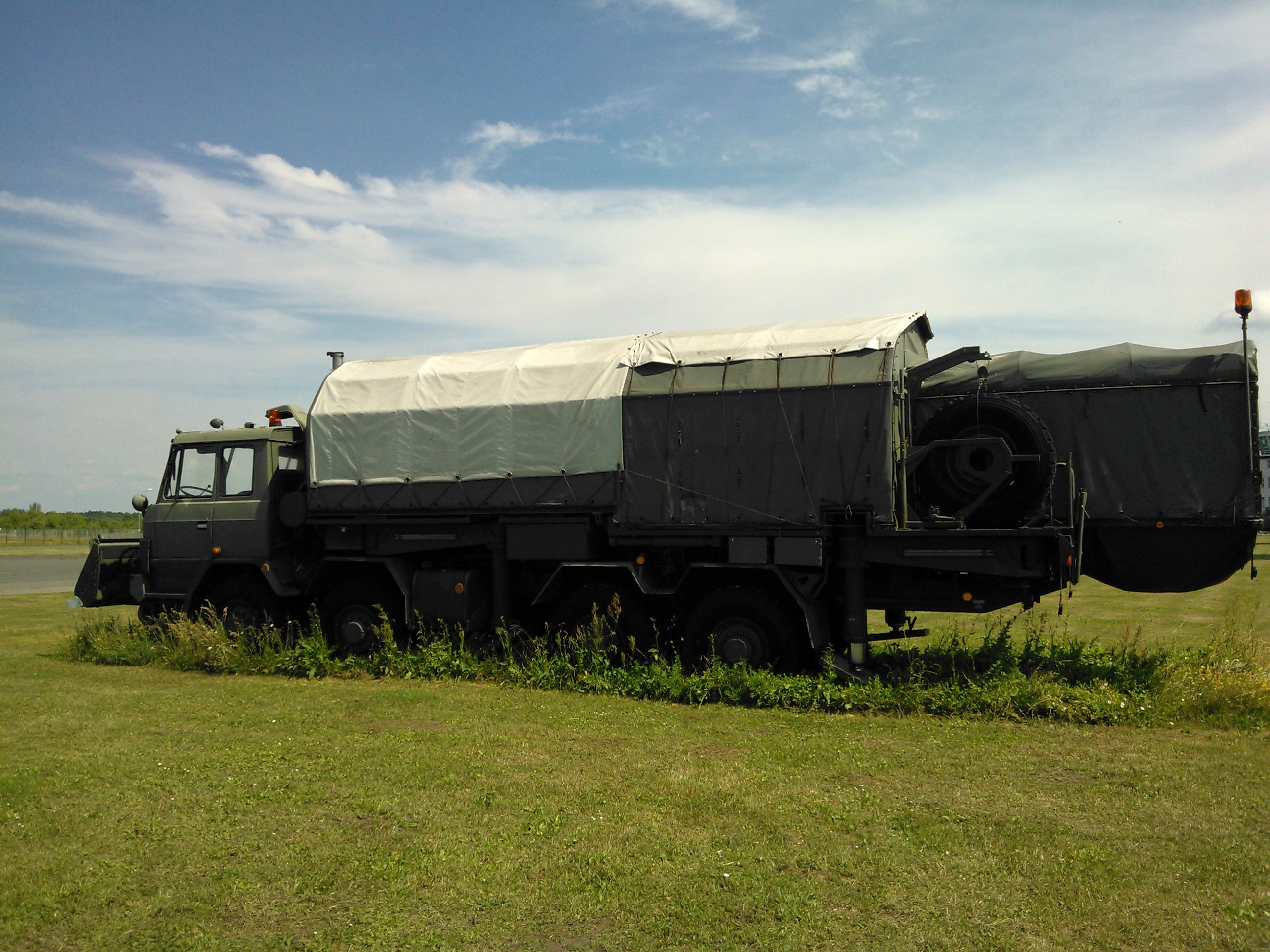 In Gatow